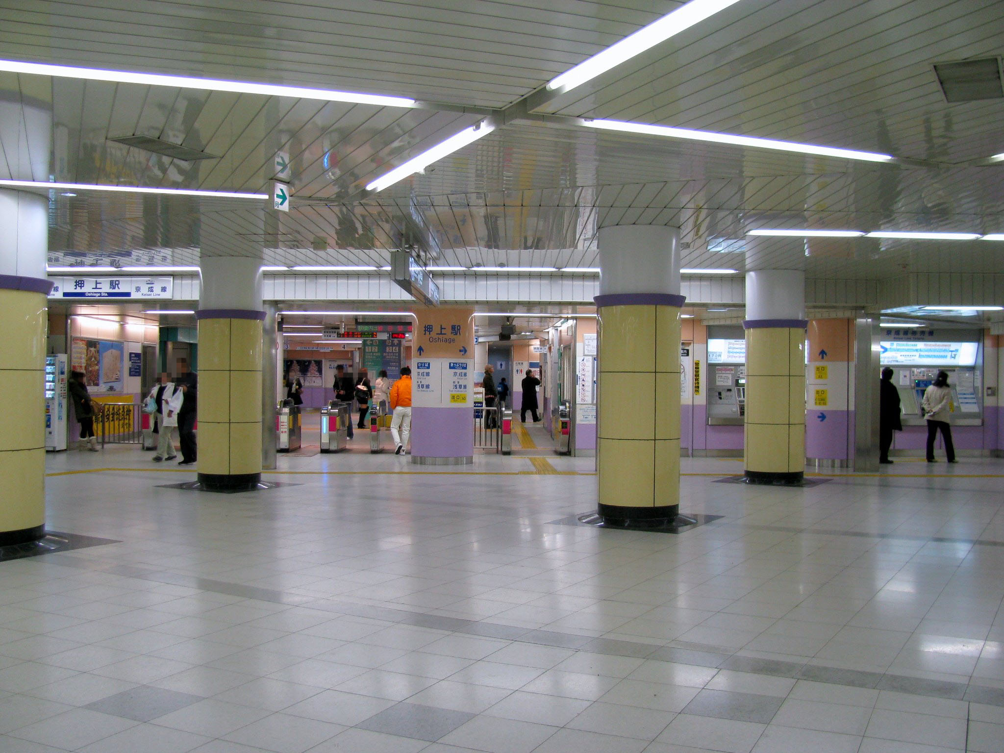 京成電鉄押上駅